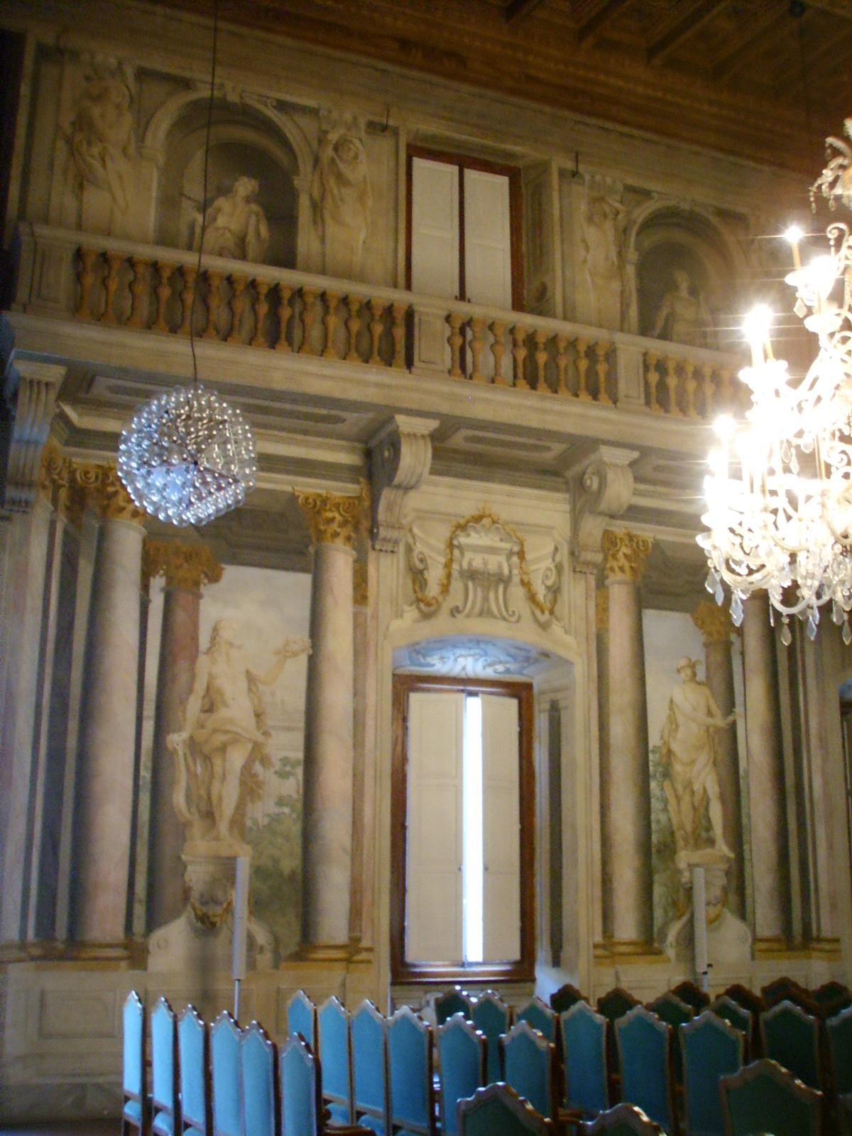 Palazzo incontri, salone affrescato, lato e